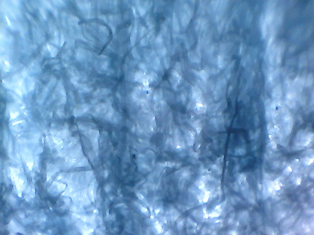 Esta imagen fue sacada con un microscopio electrónico